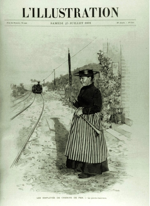 La garde barrière, L'Illustration du 25 juillet 1891, photo-gravure expérimentale par Henri Thiriat.